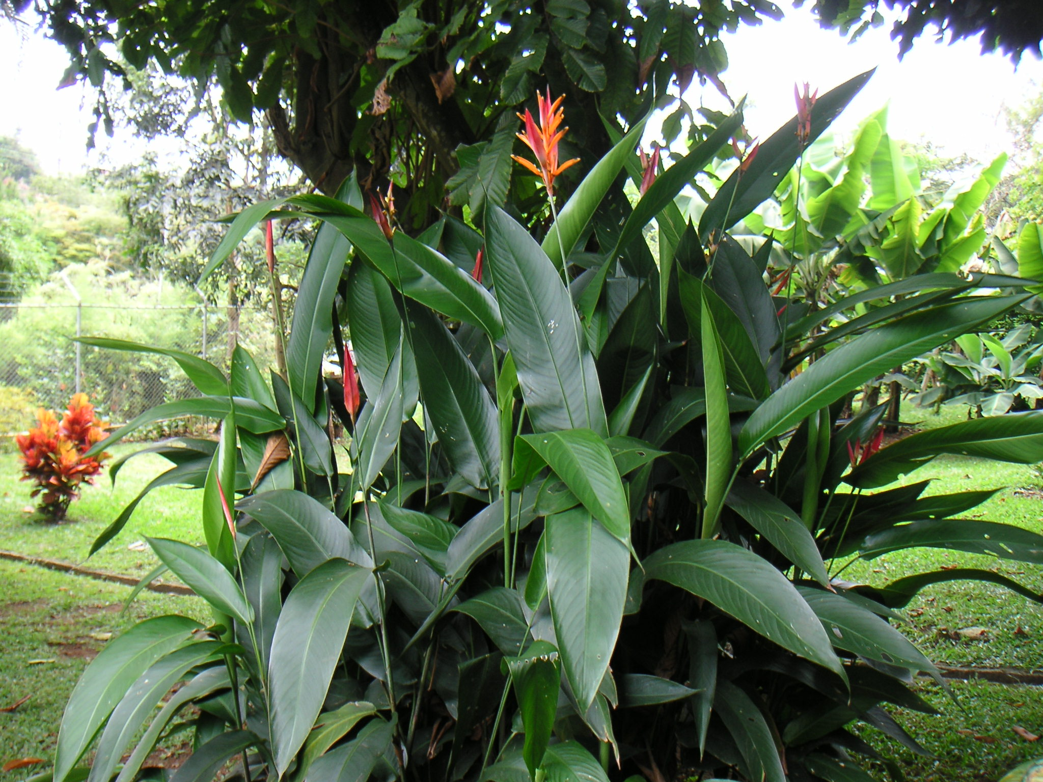 Der Fotografin unbekannte Pflanze, Cali / Kolumbien